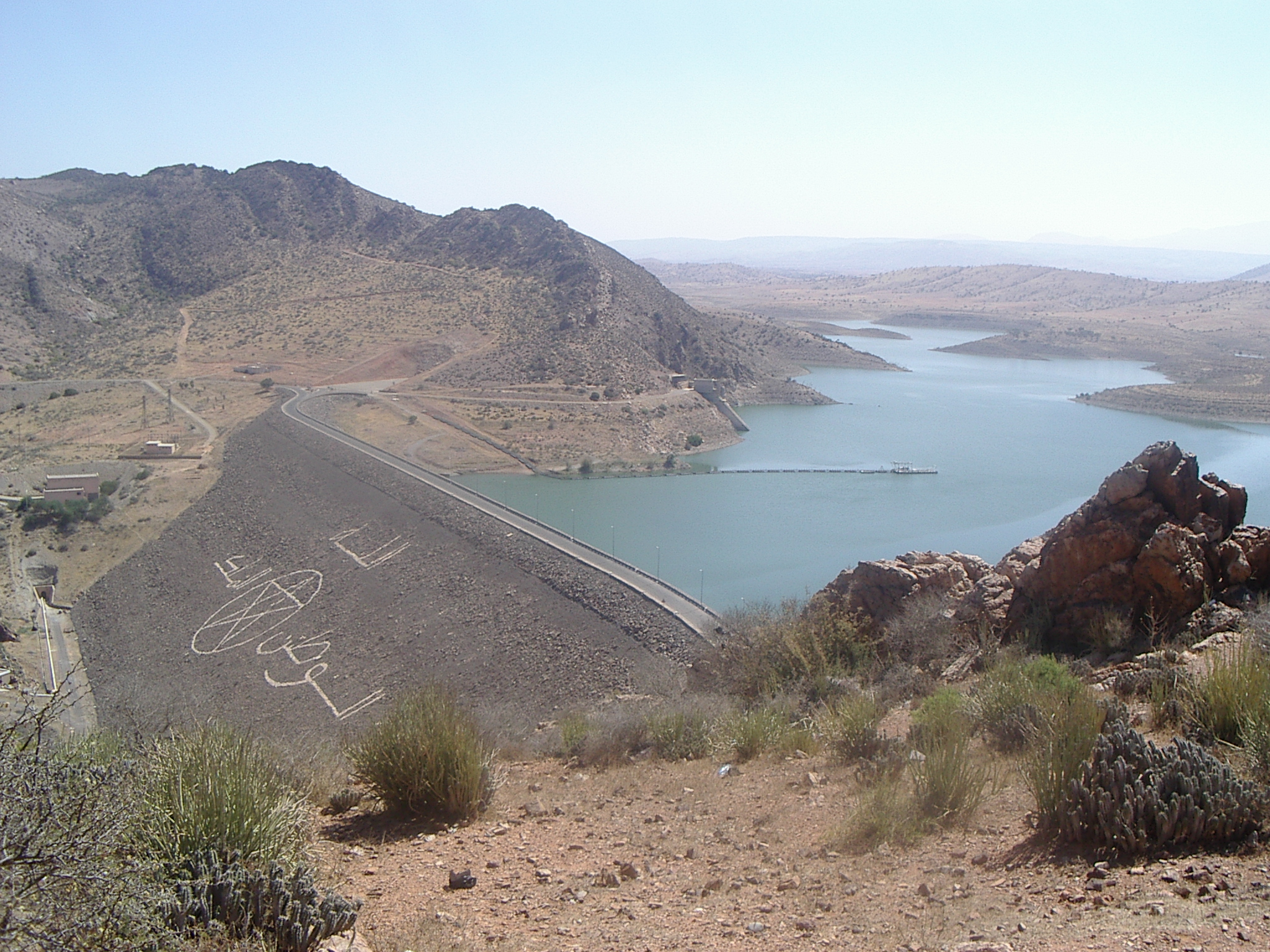 Barrage Youssef Ibn Tachfin dans la province de Tiznit (Maroc)